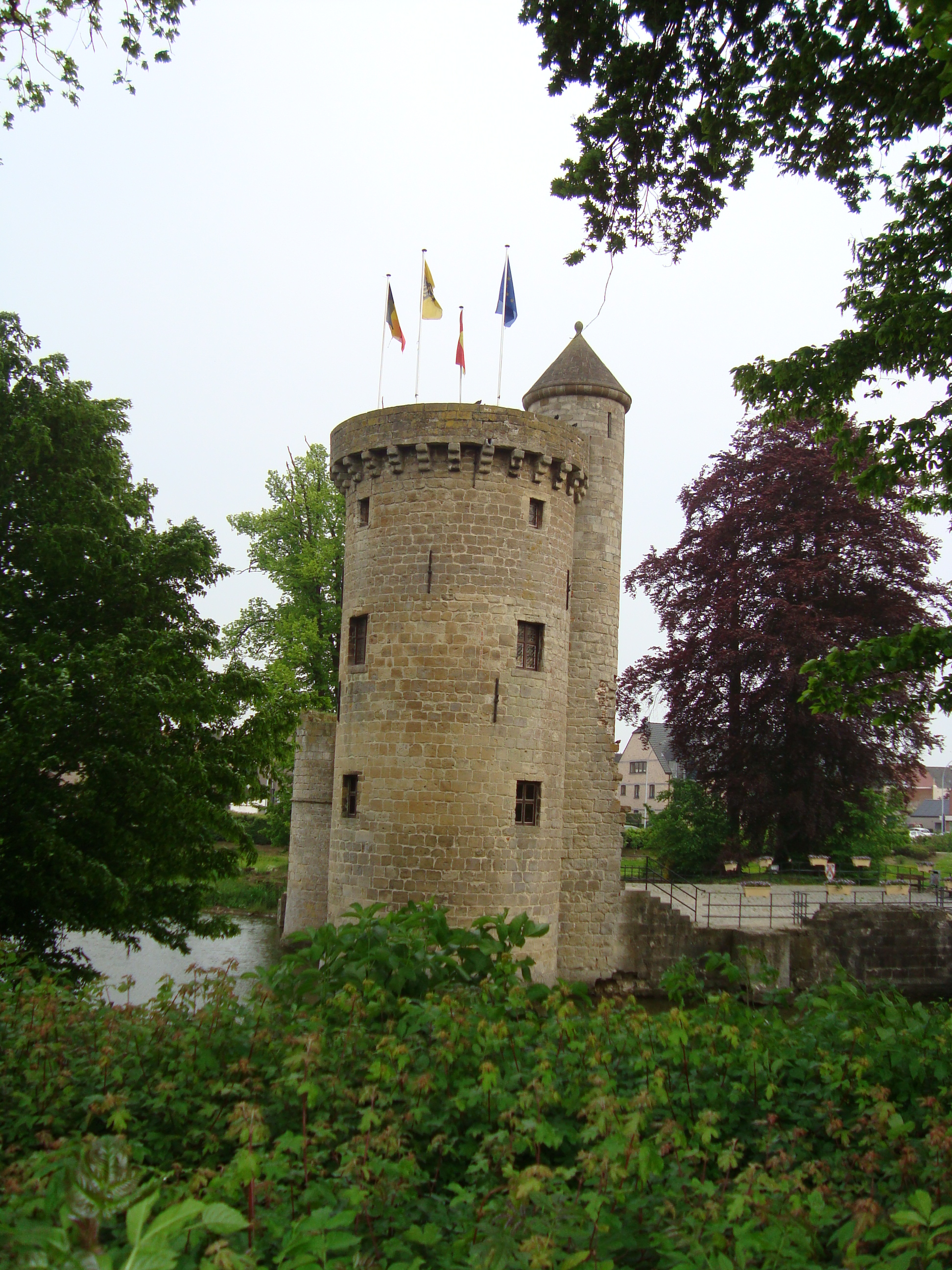 Burchtruïne uit 1579 te Herzele